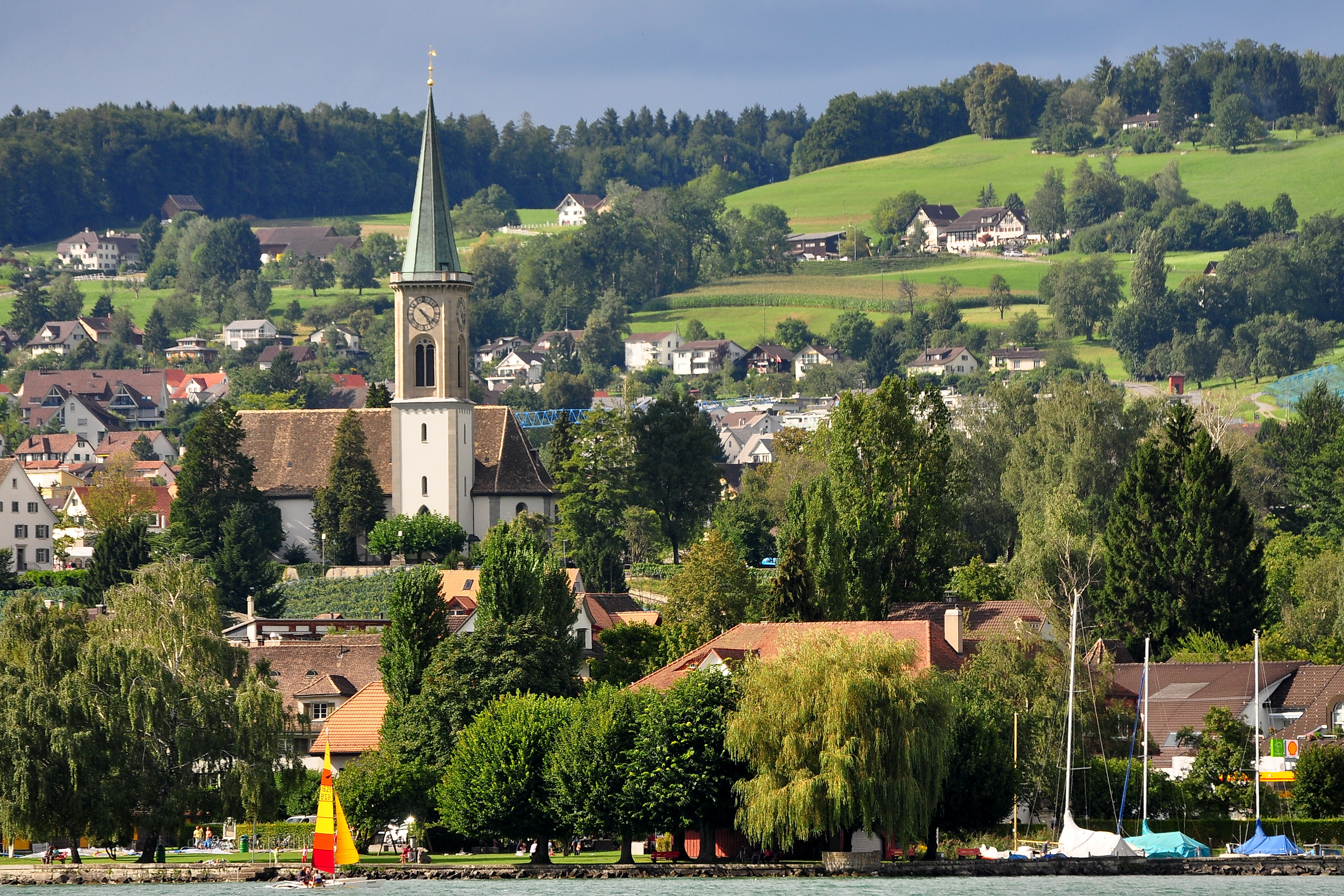 Stäfa as seen from Zürichsee-Schiffahrtsgesellschaft (ZSG) MS Limmat on Zürichsee in Switzerland